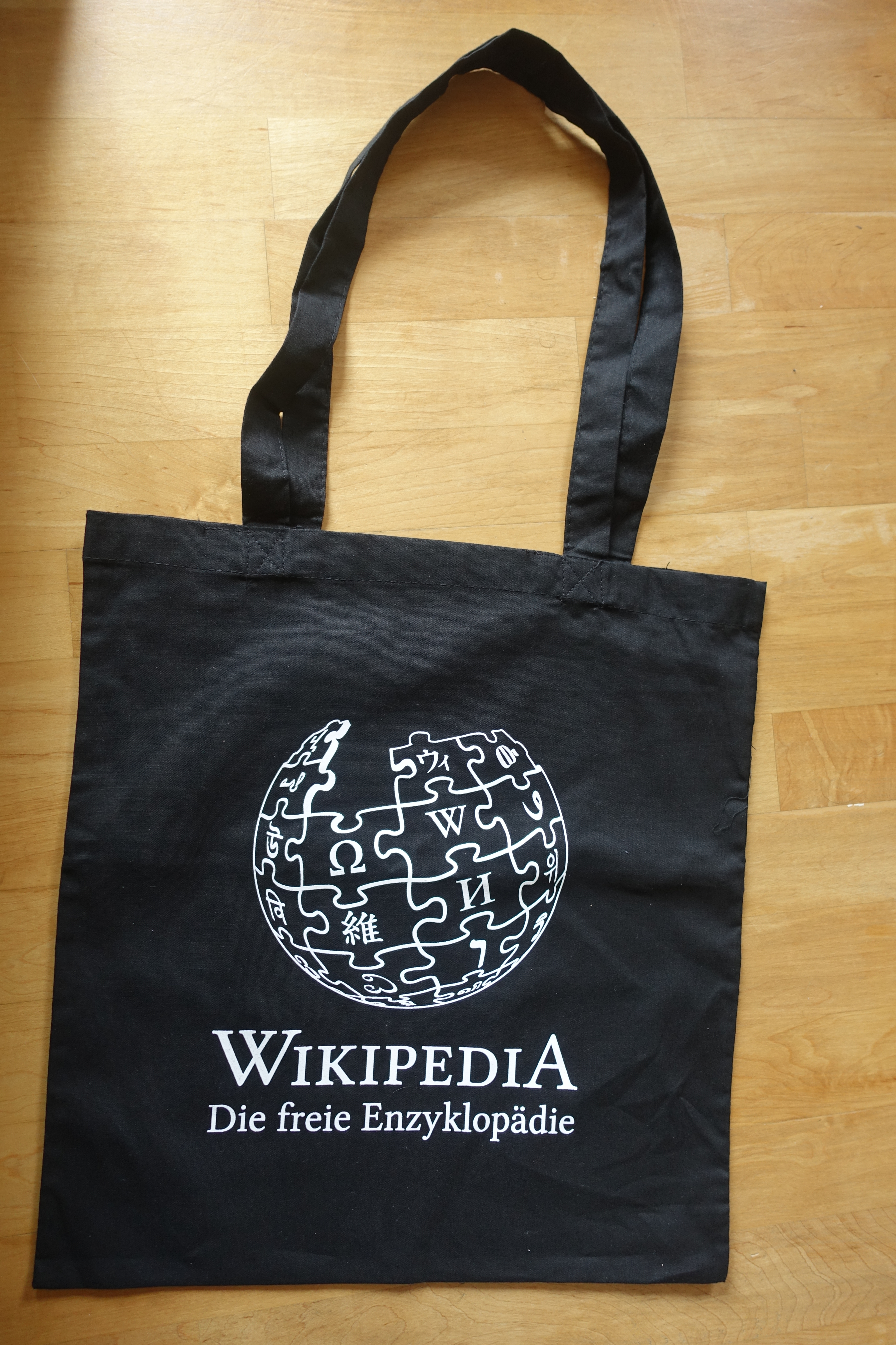 Eine Stofftasche mit Wikipedia-Logo